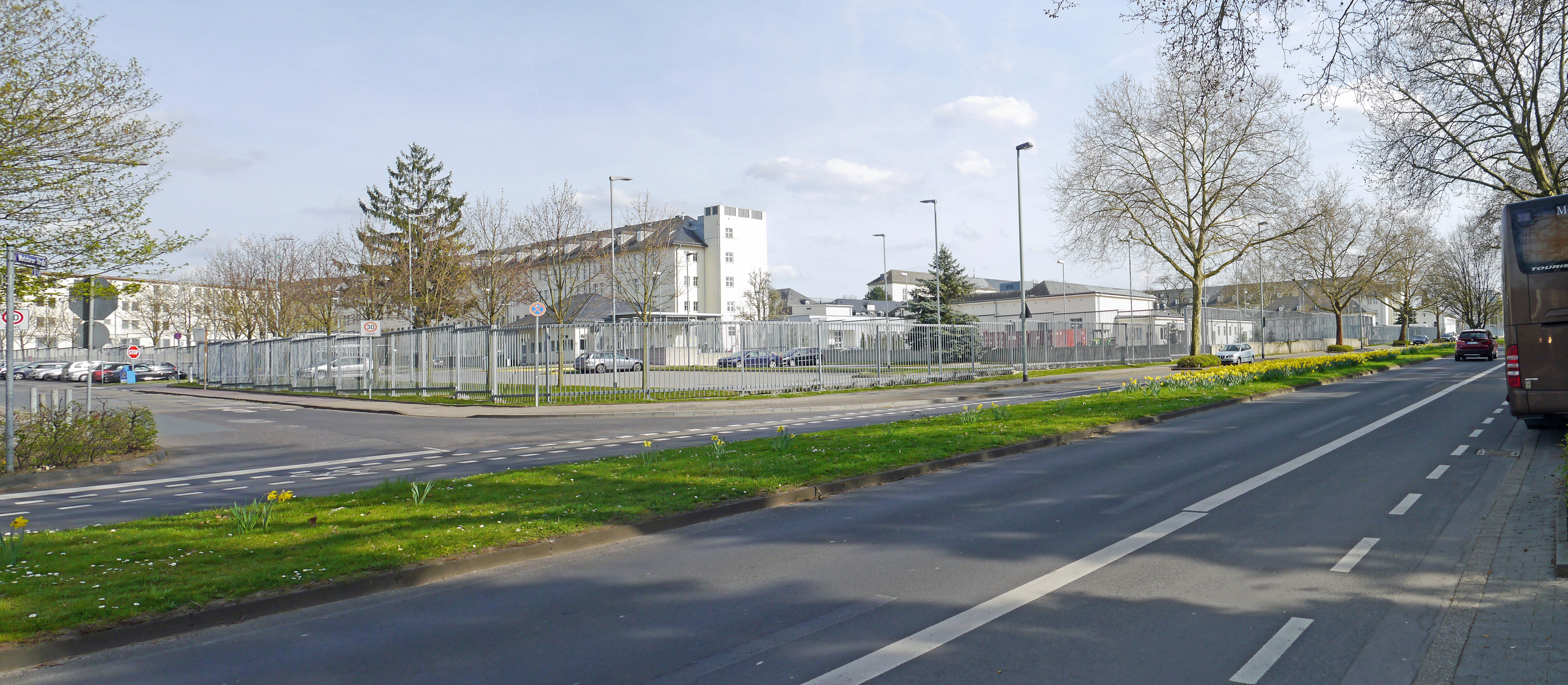 US-Generalkonsulat in Frankfurt am Main. 2015, Ansicht von der Giessener Strasse.